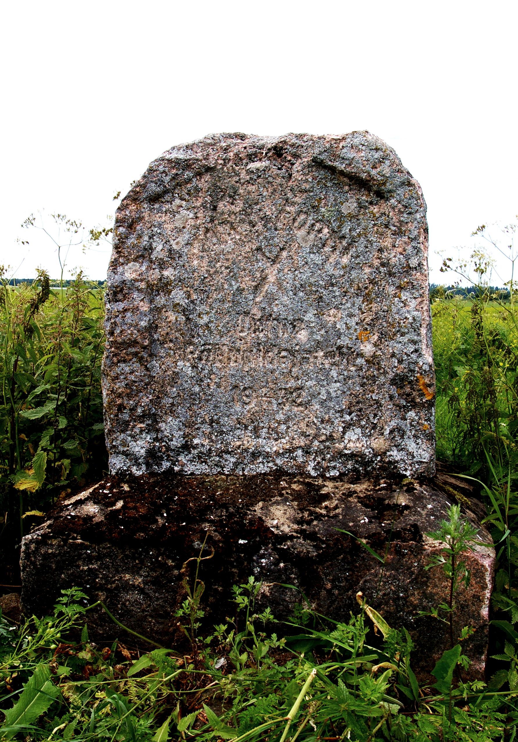 Maareform 1919. aastast nägi ette kõikide mõisamaade võõrandamise. Uhtna mõisa maad jagati ametlikult välja 1. mail 1922. 1932. aastal püstitasid kohalikud põllumehed maareformi tähistamiseks põllumeeste kivi. ["Pärandkultuur Sõmeru vallas" Sõmeru 2014]